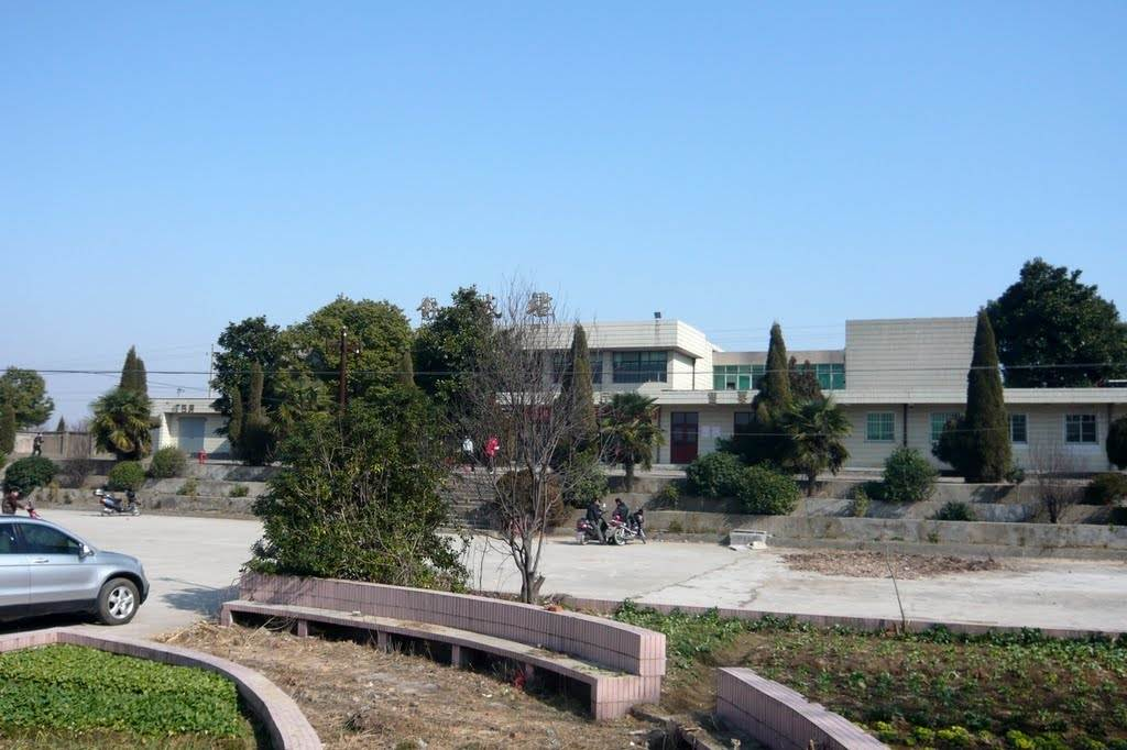 舒城站外景